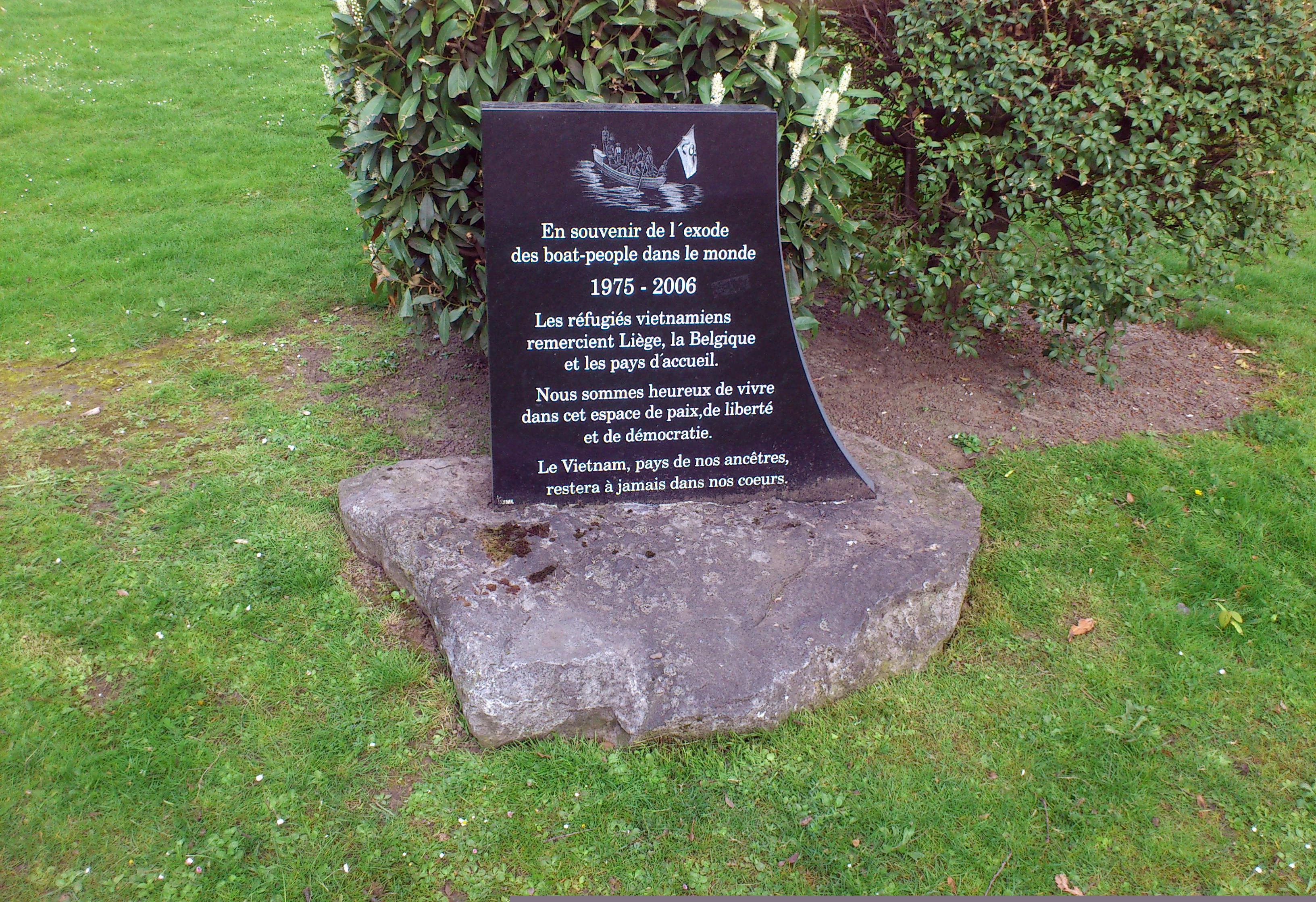 Stèle de remerciements des réfugiés et boat-people vietnamiens adressés à la Ville de Liège, à la Belgique et aux autres pays d'accueil.